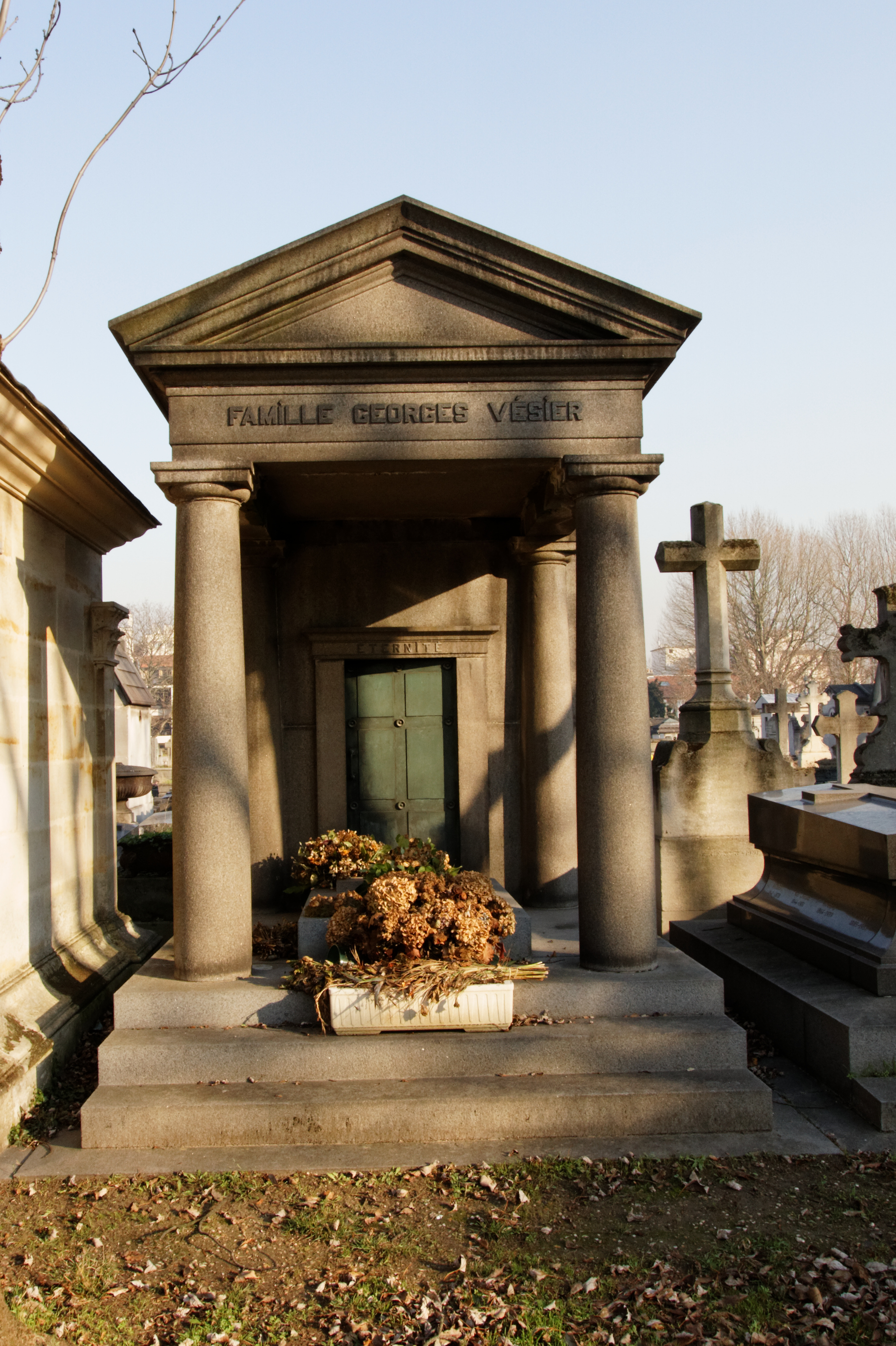 Cimetière du Père-Lachaise